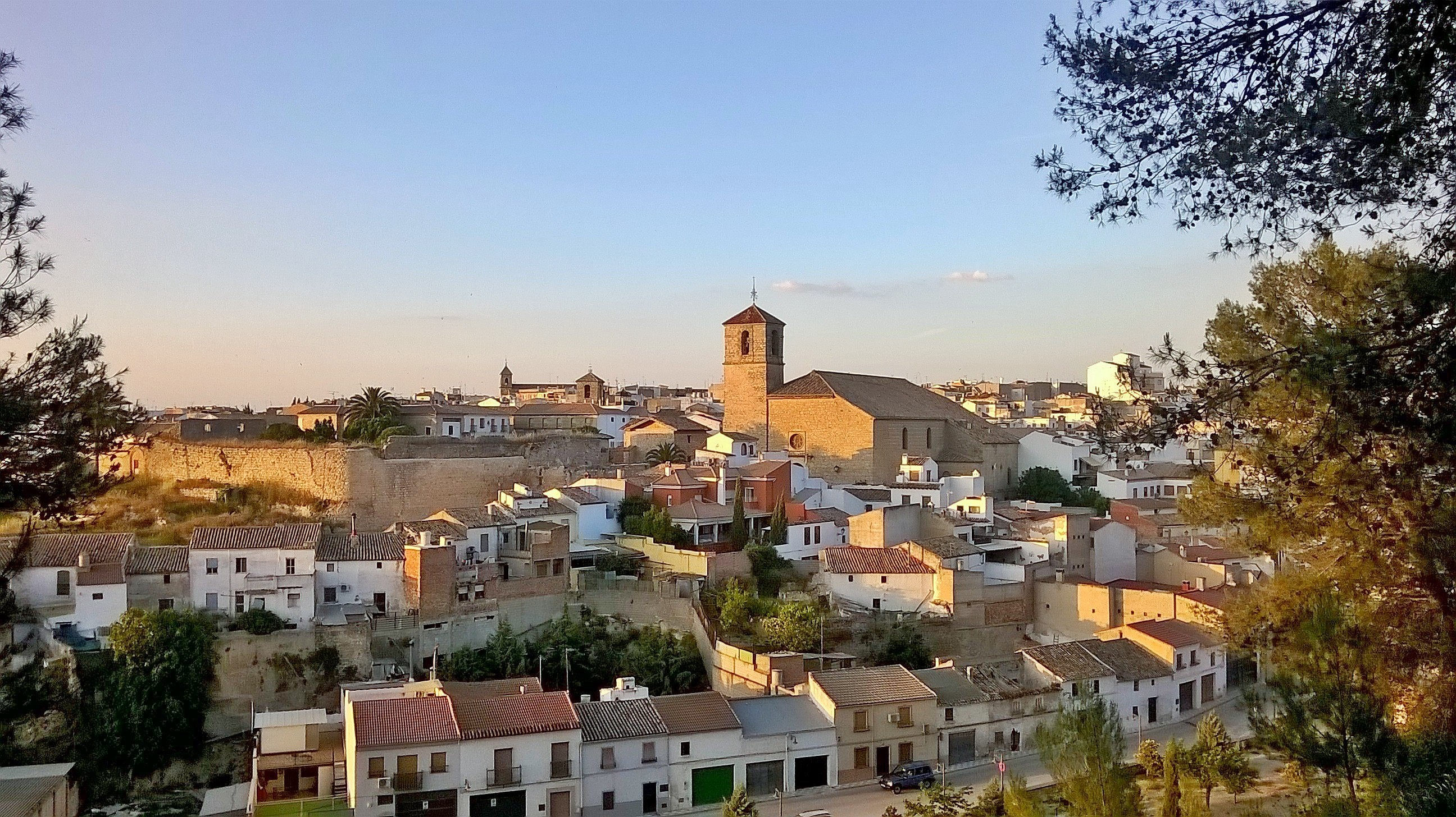 Vistas